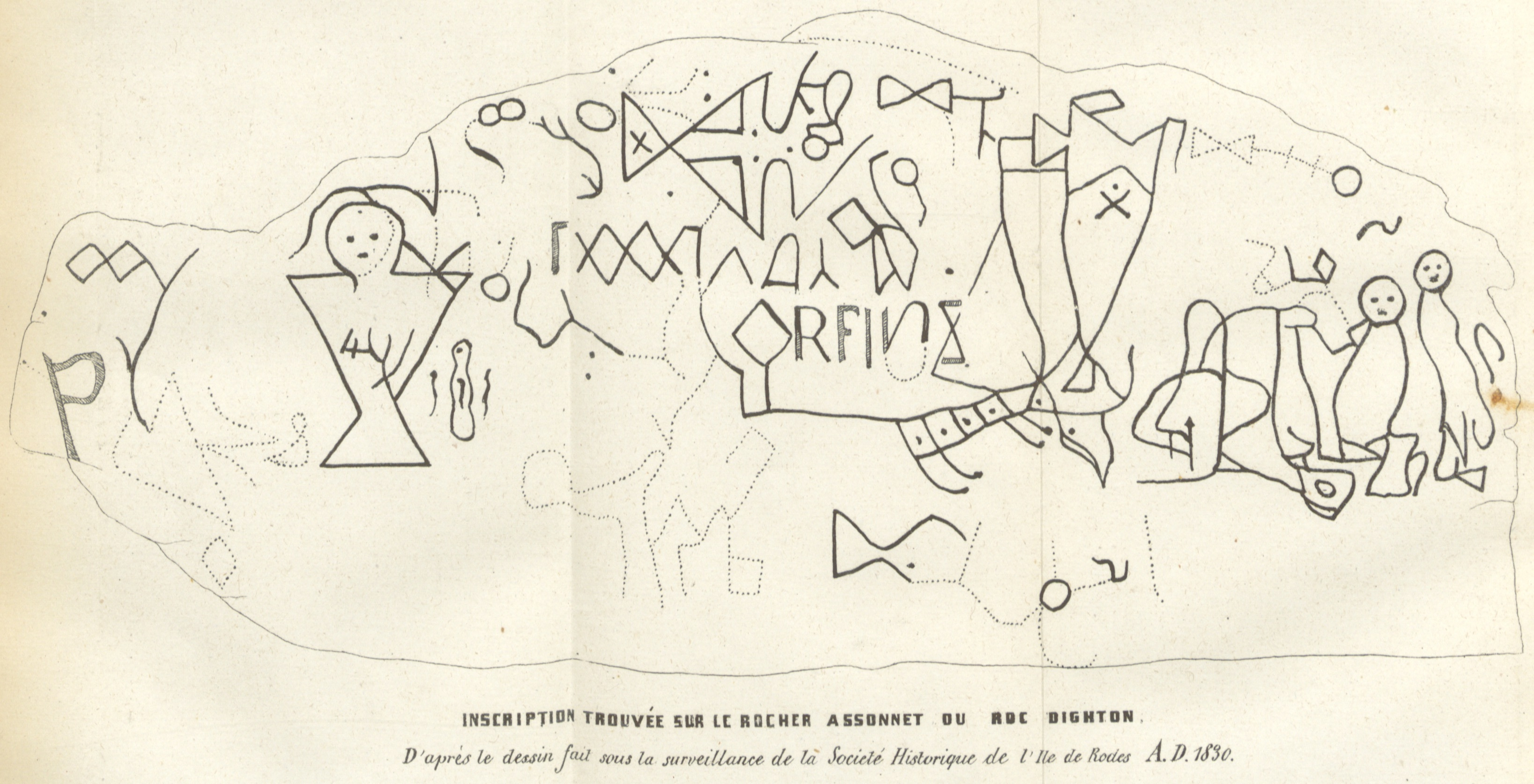 Ce monument remarquable a été examiné avec soin en 1830, par une commission de la société historique établie à Providence, ville natale de Fauteur de cet ouvrage, dans l'Etat avoisinant de Rhode-Island.